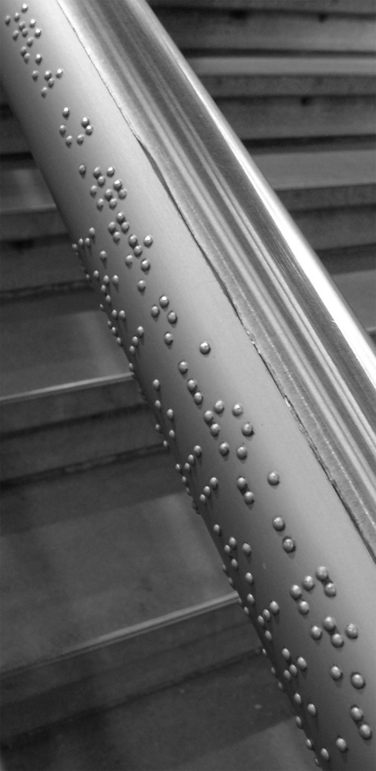 Handlauf einer Treppe im Hamburger Hauptbahnhof. Die Beschriftung besteht aus drei Zeilen, wobei die oberste Zeile (zeigt nach links unten) auf dem Foto nicht mehr zu lesen ist. In der zweiten Zeile steht: KIR(CH)ENALLEE LINKS In der dritten Zeile steht: CITY-MÖNCKEBERG(ST)RAßE RE(CH)TS